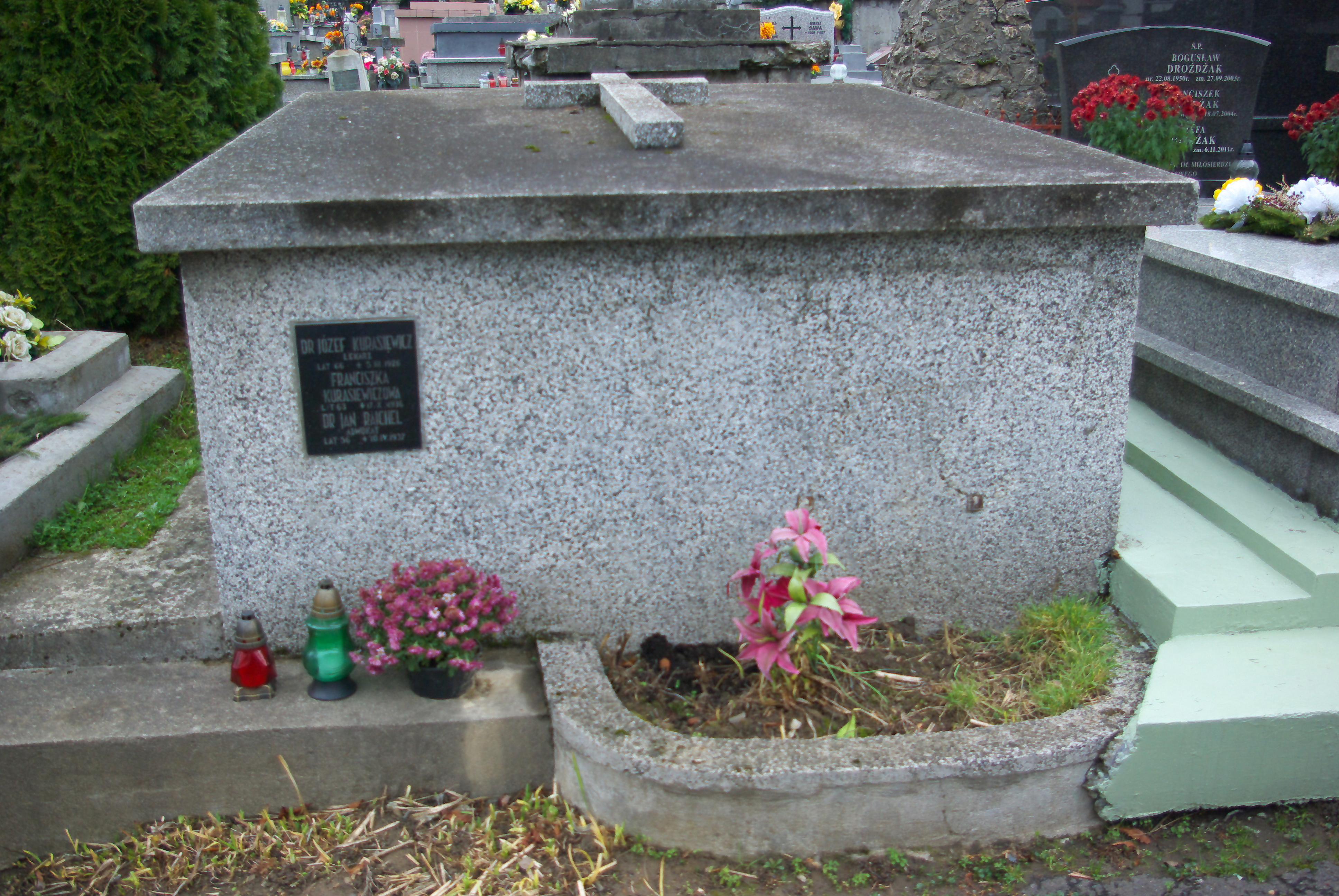 Grobowiec rodziny Kurasiewicz i Jana Rajchla, 2013